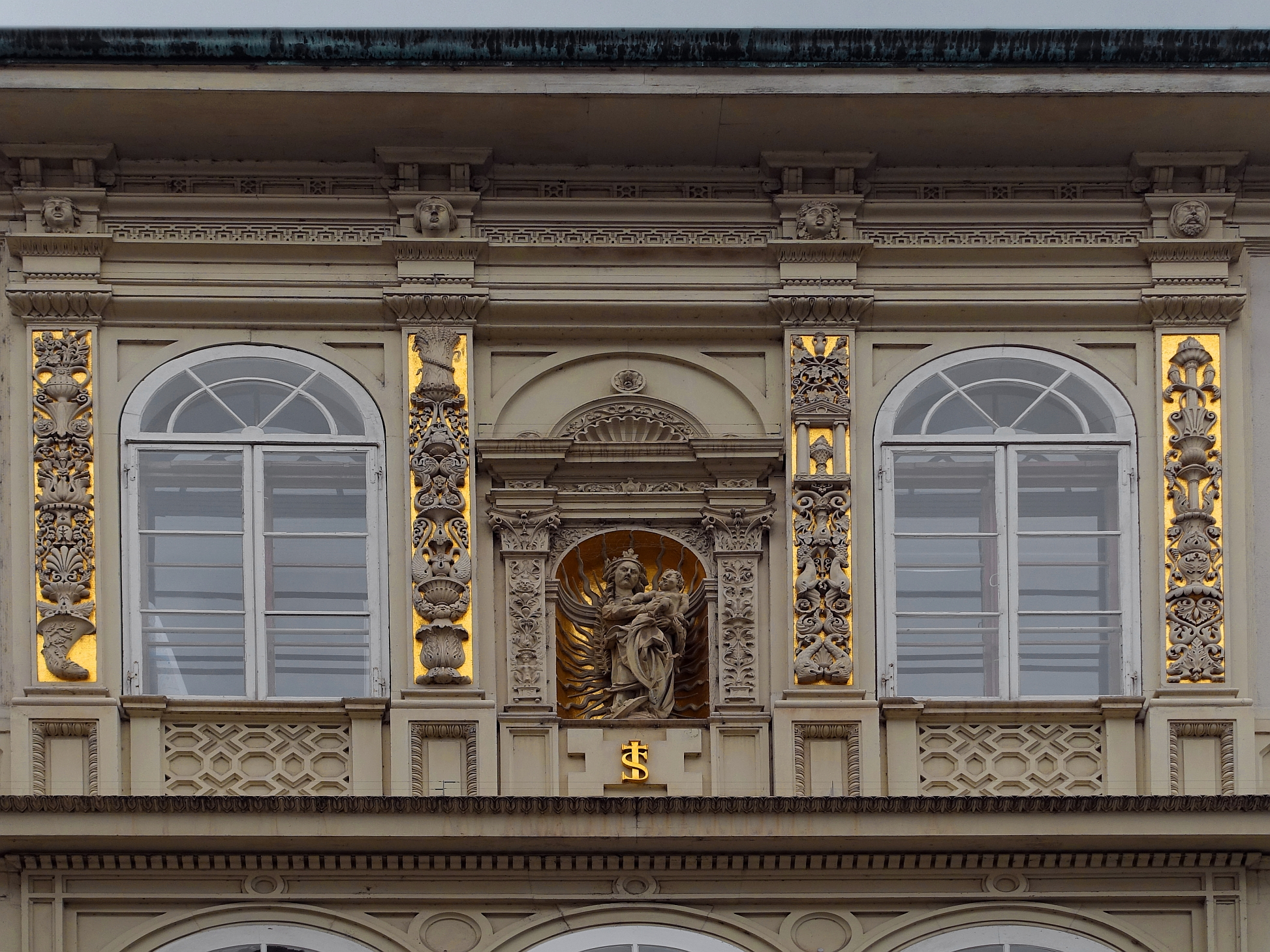 Madonna in der Nische aus dem 16.Jahrhundert. Anbau des Flügels 1841 gegen den Münsterberg von Christoph Riggenbach (1810–1863)